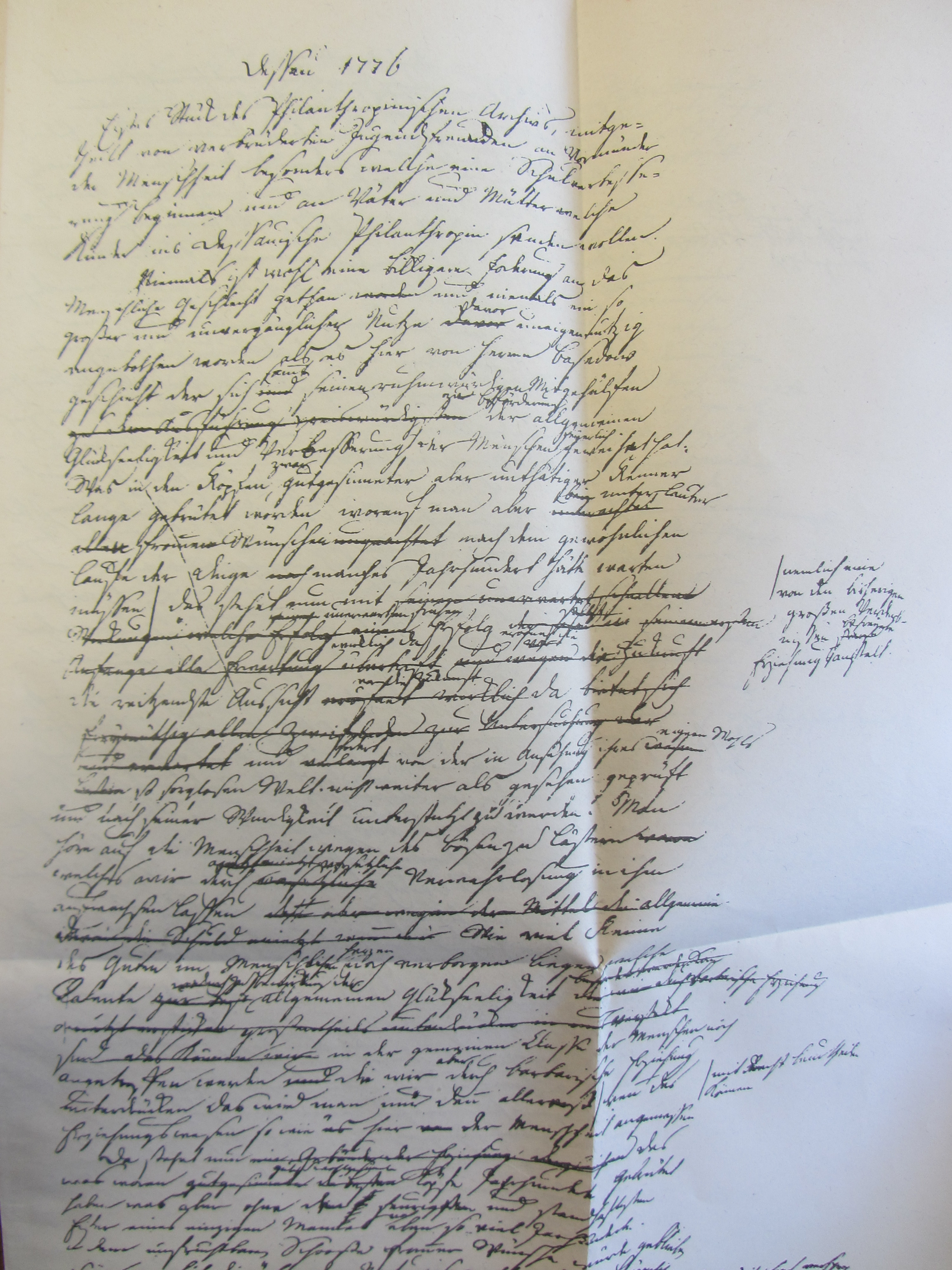 Fac-similé d'un manuscrit autographe d'Emmanuel Kant : son premier essai sur le Philanthropin publié en 1776 dans dans les "Königsbergische Gelehrte und Politische Zeitungen", Johann Jakob Kanter, Königsberg, no 26, 28 mars 1776.